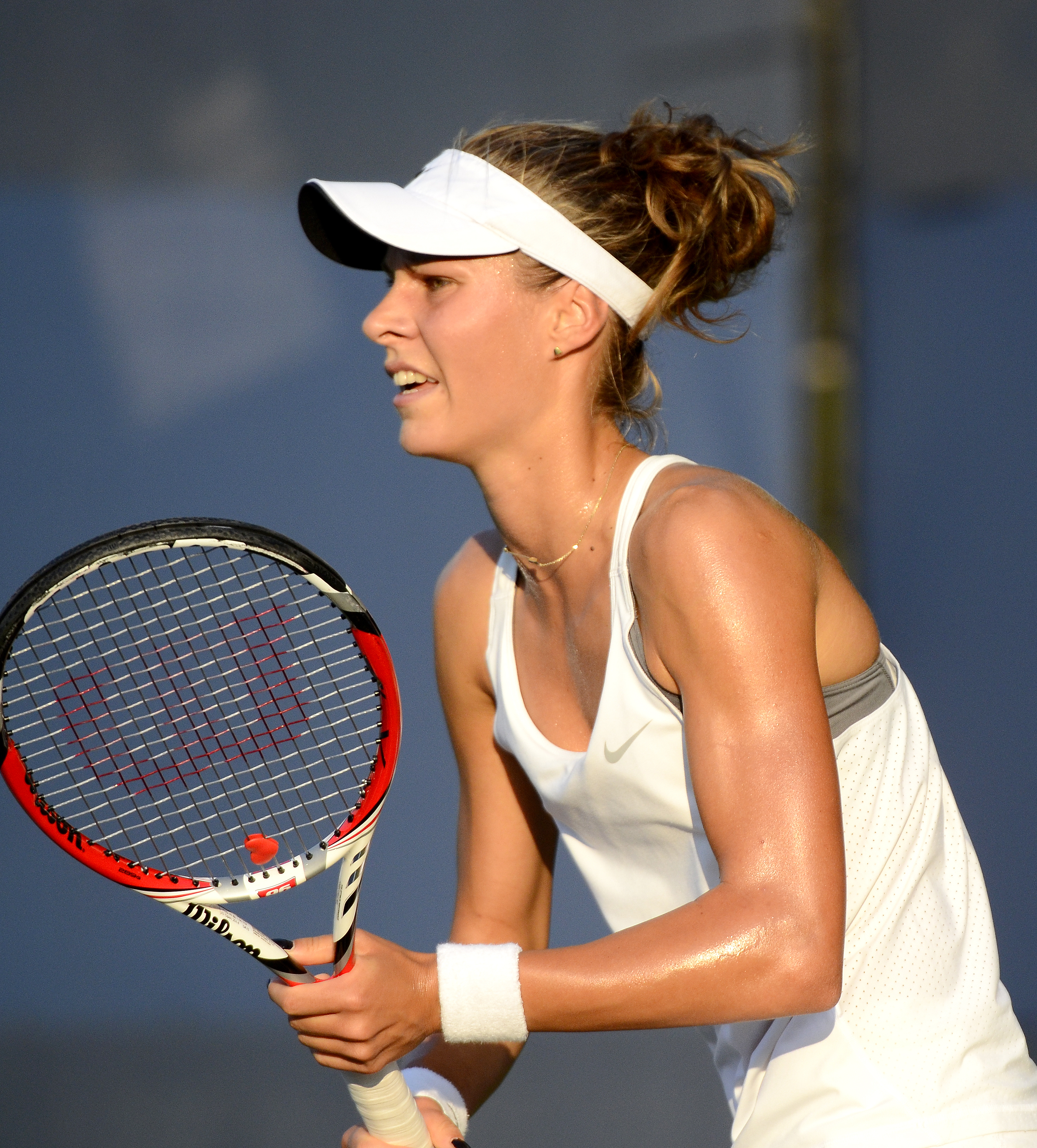 August 26, 2014 Queens, NY Aleksandra Krunic (SRB) def. Katarzyna Piter (POL)